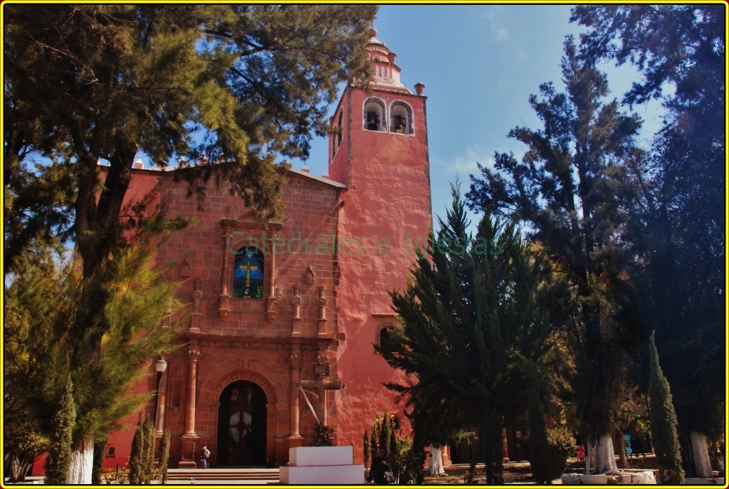 El Templo y exconvento de San Miguel Arcángel se encuentra localizado en la ciudad de Ixmiquilpan, Hidalgo (México). Pertenece al conjunto de edificaciones del tipo fortaleza levantadas por los agustinos en el siglo XVI.